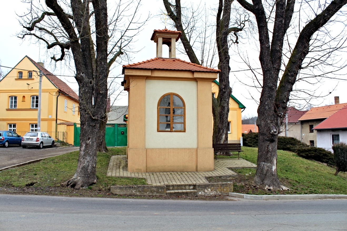 Čelechovice